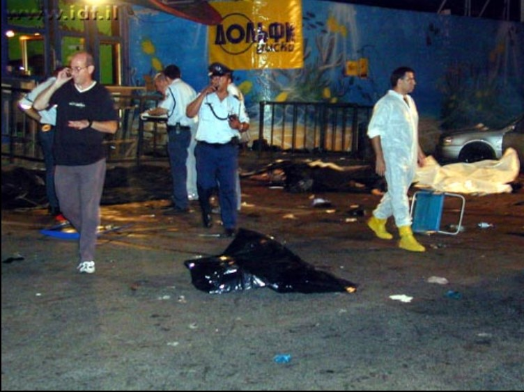 הפיגוע בדולפינריום